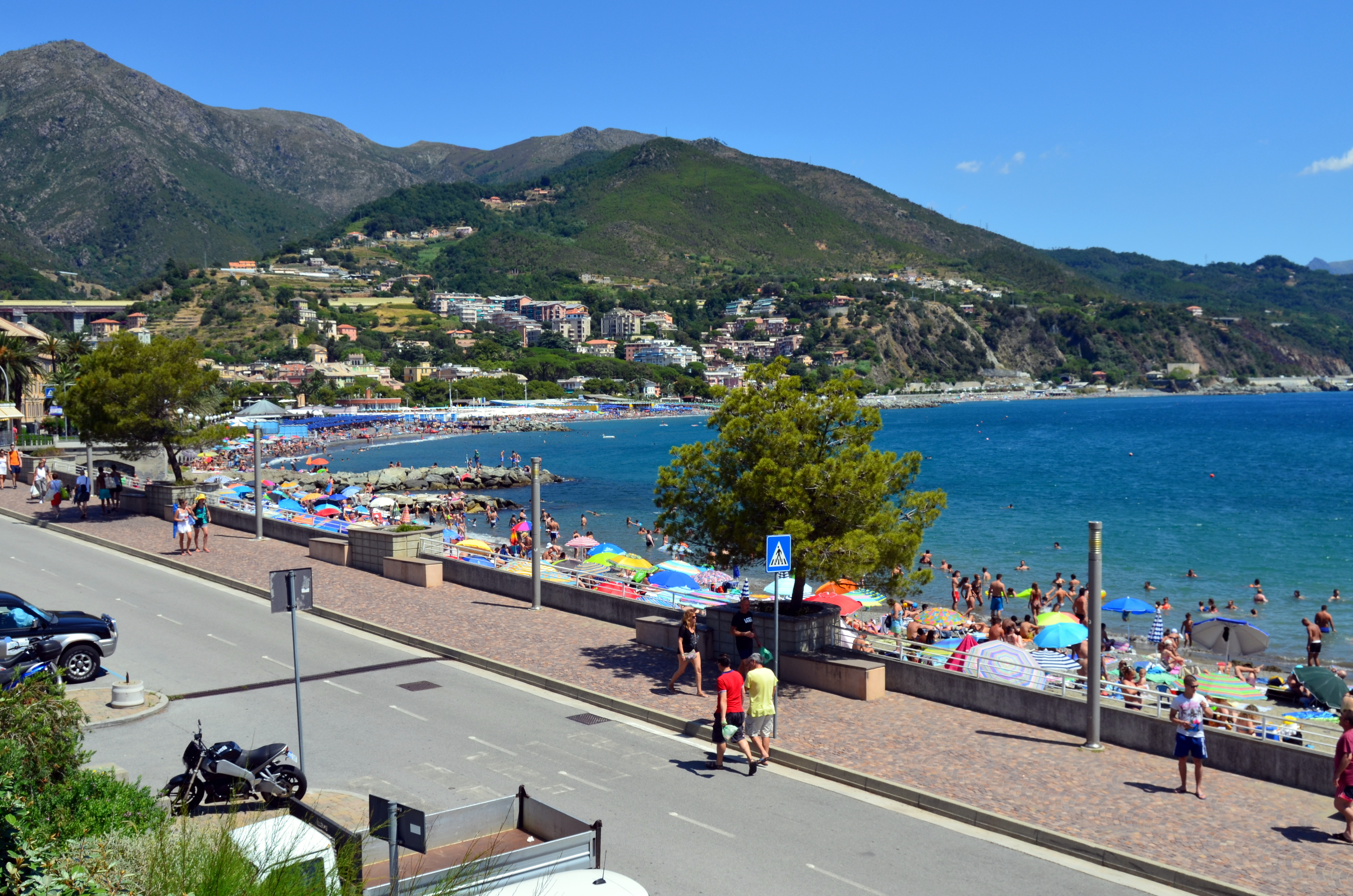 Il litorale di Arenzano, Liguria, Italia